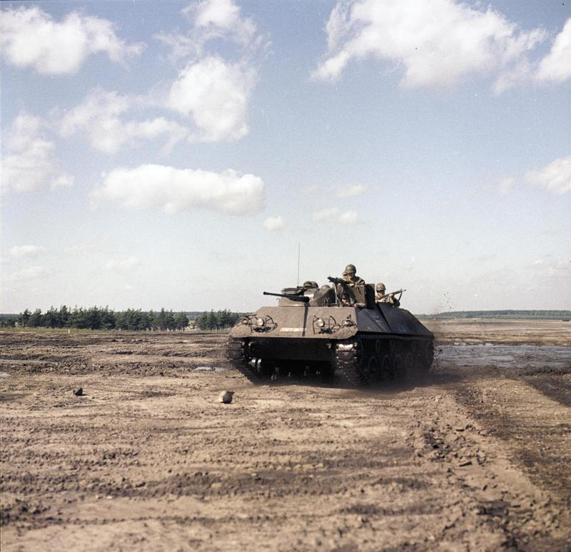 Reportage Bundeswehr Leopardpanzer, Munsterlager, KTrS III [Munsterlager, Truppenübungsplatz in der Lüneburger Heide]